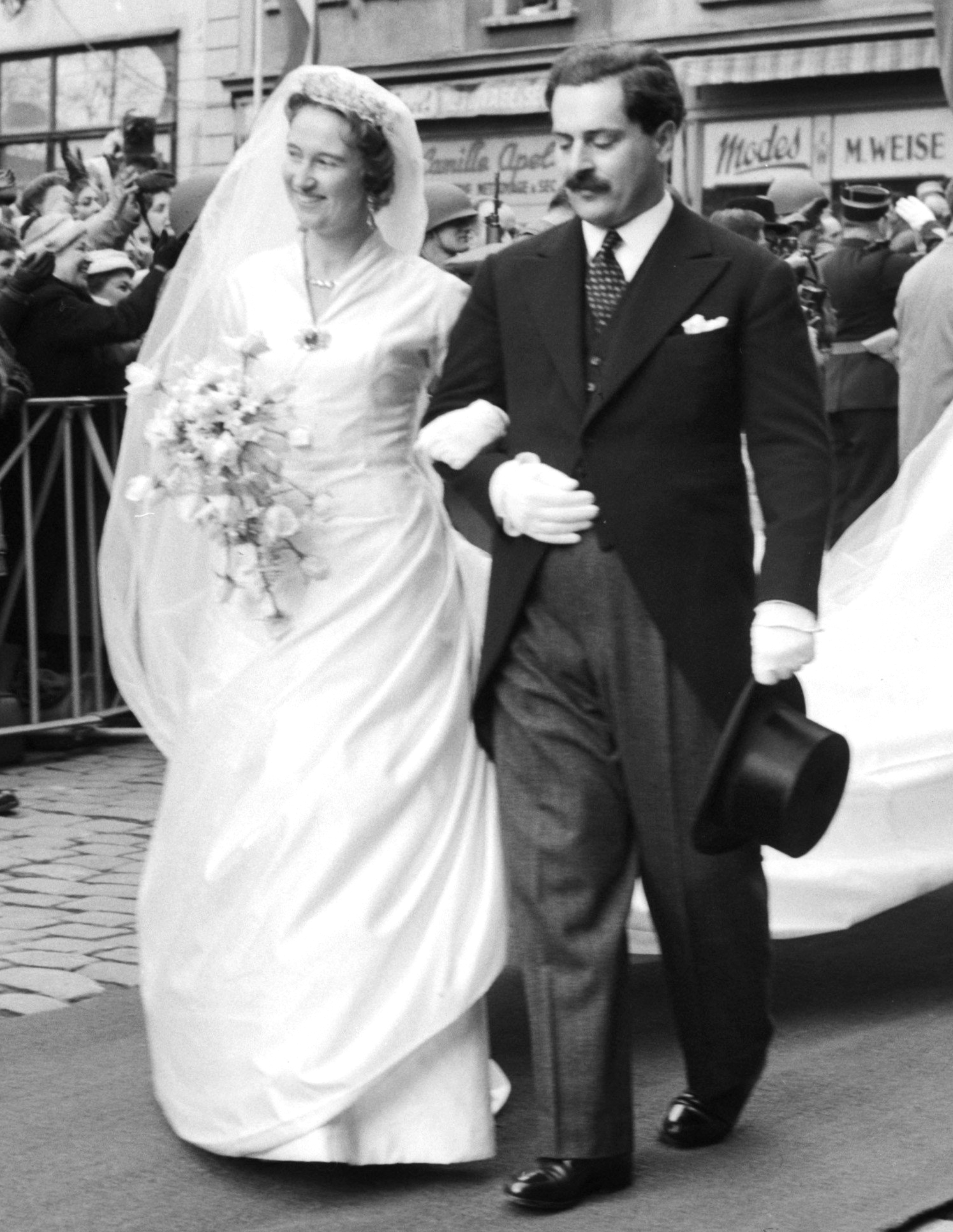 Original caption: "Huwelijk van Prinses Maria Adelaide van Luxemburg met Graaf Charles Joseph Graaf Henckel von Donnersmarck in Luxemburg. Prinses Maria met haar echtgenoot. " — Nationaal Archief